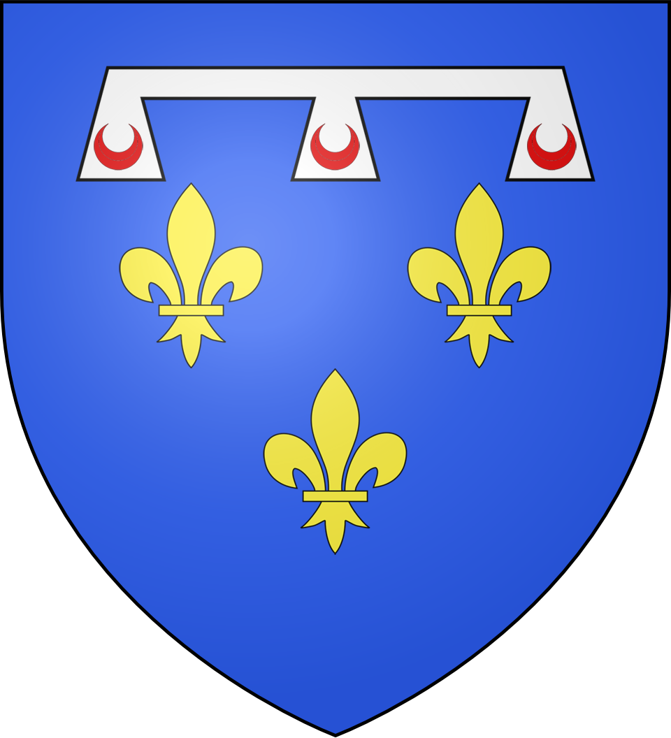 Blason du comté Valois d'Angoulême : d'azur aux trois fleurs de lys d'or au lambel d'argent à trois pendants, chaque pendant chargé d'une lune de gueules